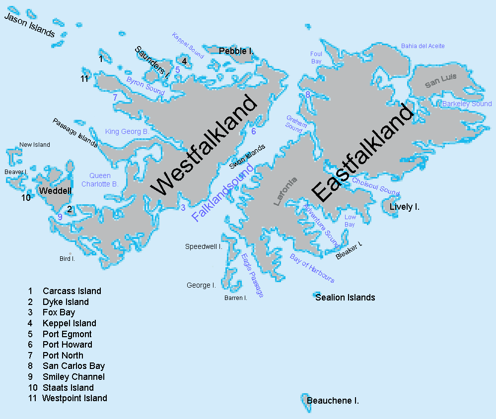 Falklands Inseln(inseln) Legende Carcass Island Dyke Island Fox Bay Keppel Island Port Egmont Port Howard Port North San Carlos Bay Smiley Channel Staats Island West Point Island